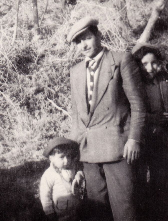 Il bracciante rivoluzionario lucano Giuseppe Novello con il figlio Filippo in una foto scattata nel 1948